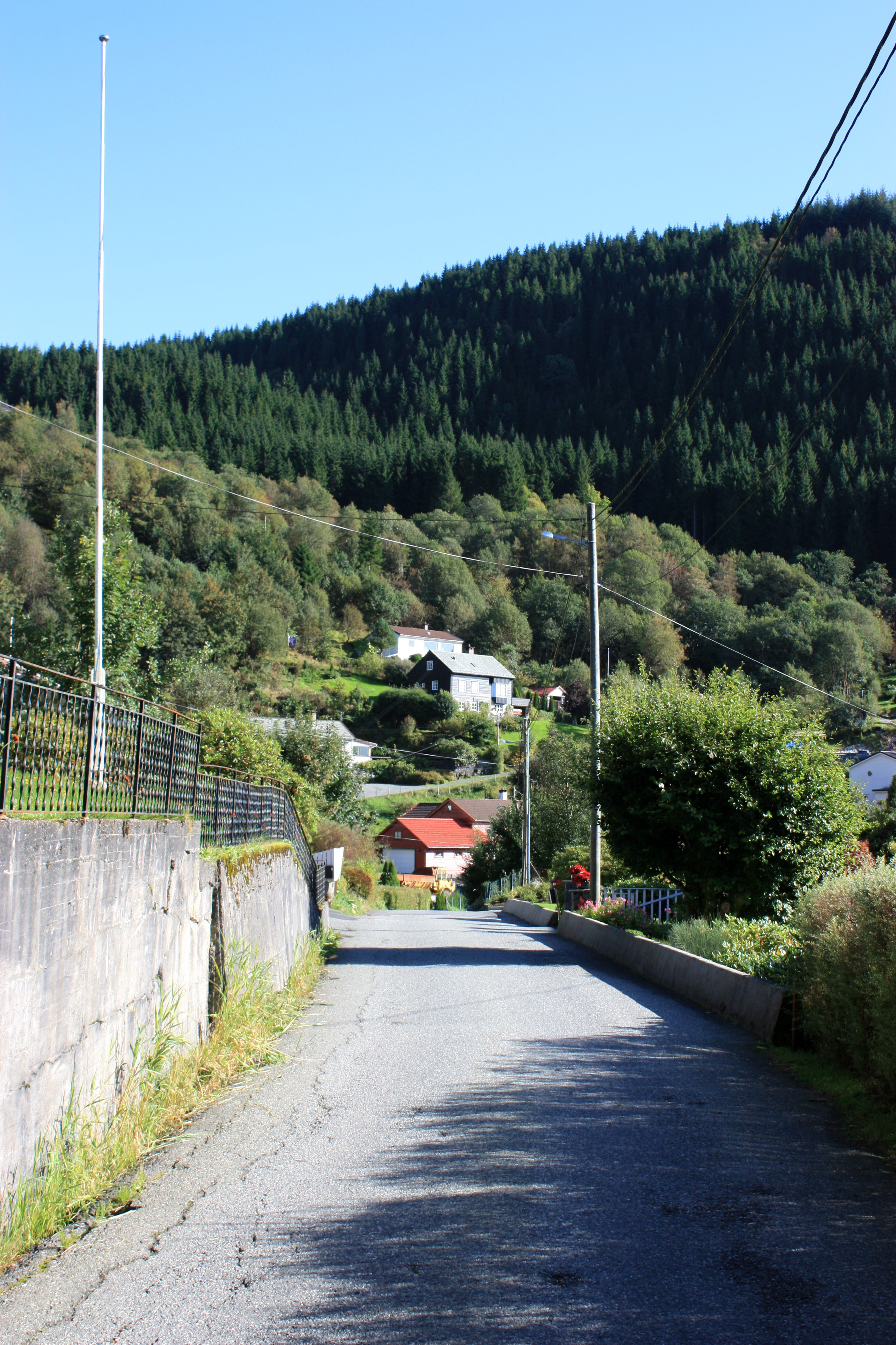 Birkelandsbotn, Fana, Bergen.